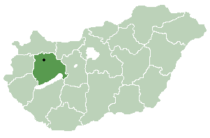 Pápa elhelyezkedése Veszprém megyében Lage von Pápa im Komitat Veszprém Location of Pápa in Veszprém county